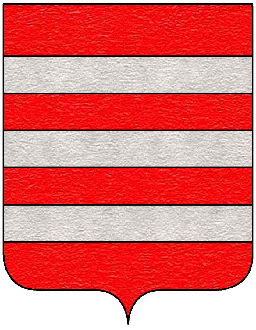 Stemma della famiglia Carafa